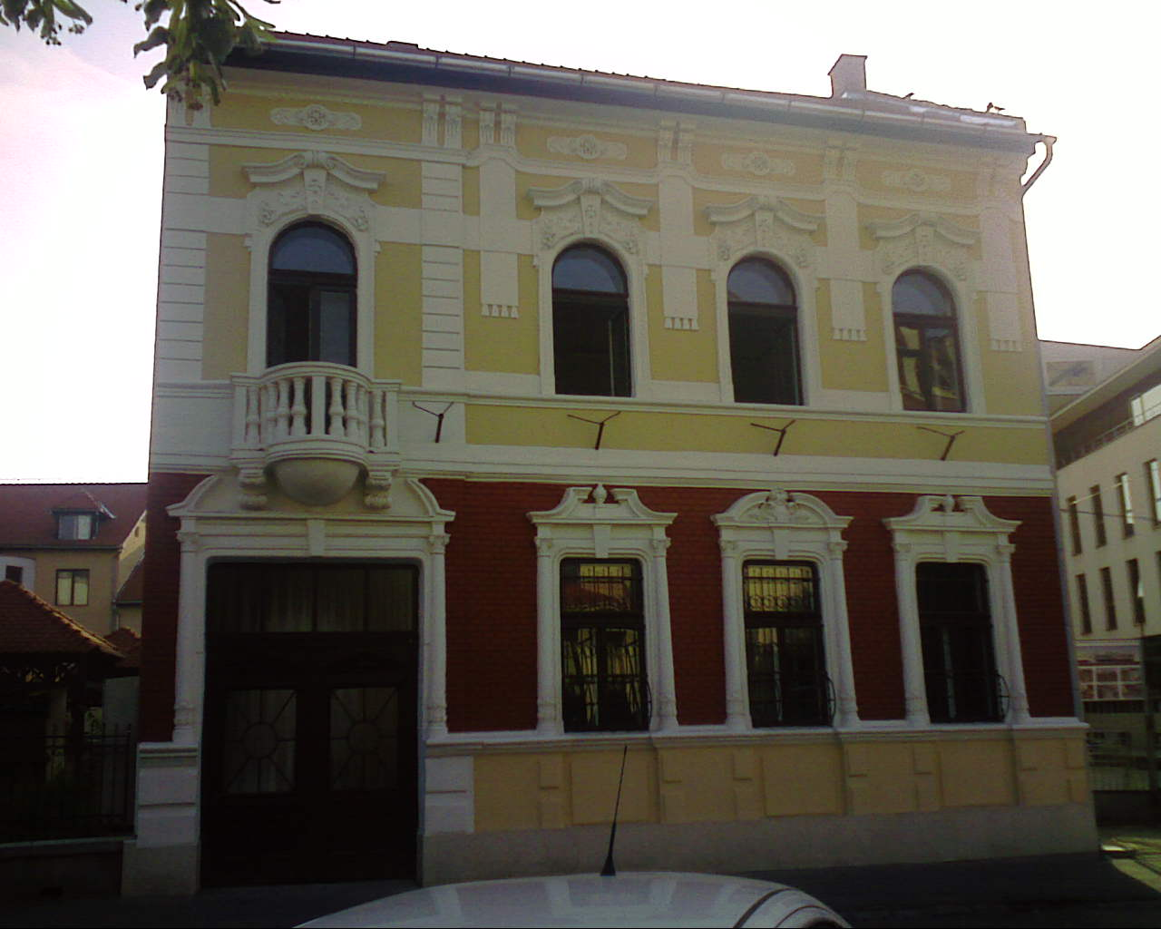 Muzeul Judeţean de Istorie şi Artă secţia de istorie Zalău